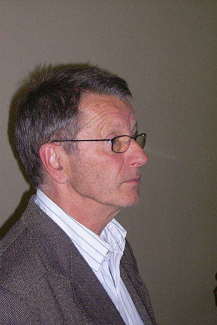 Prof. Herbert Wulf, auf einer öff. Veranstaltung in Marburg 2008